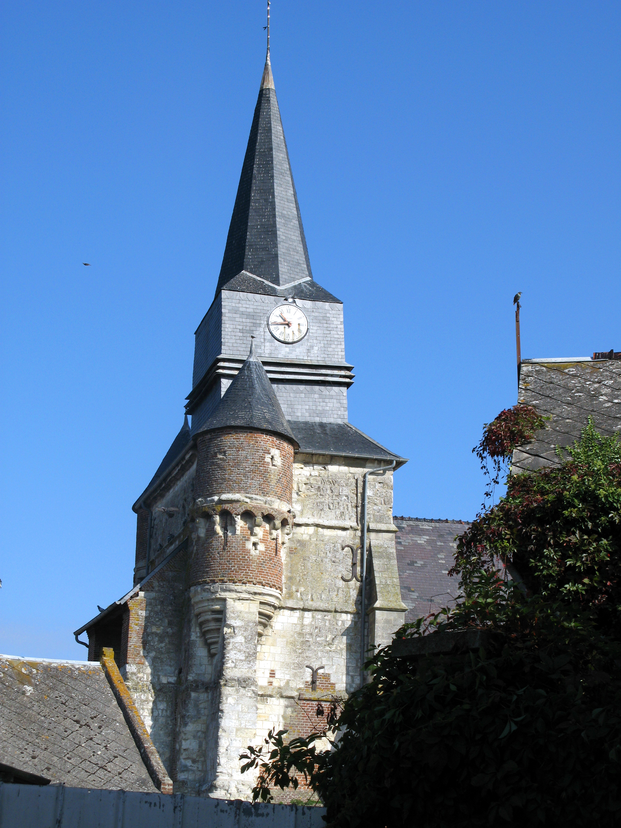 Macquigny (Aisne, France) - L'église fortifiée dont le clocher a une échauguette.